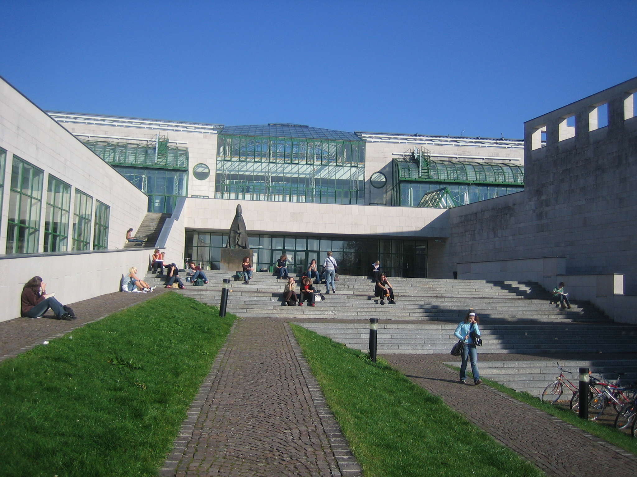 Selber aufgenommen.